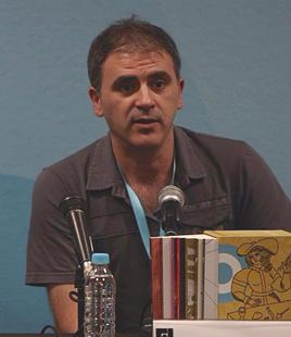 fotografía del escritor argentino Marcelo Luján en la FIL de Guadalajara